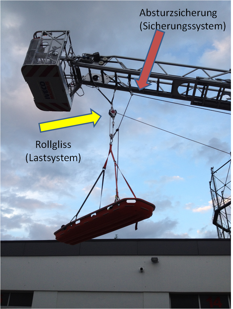 mögliche Auffängung an einer Drehleiter